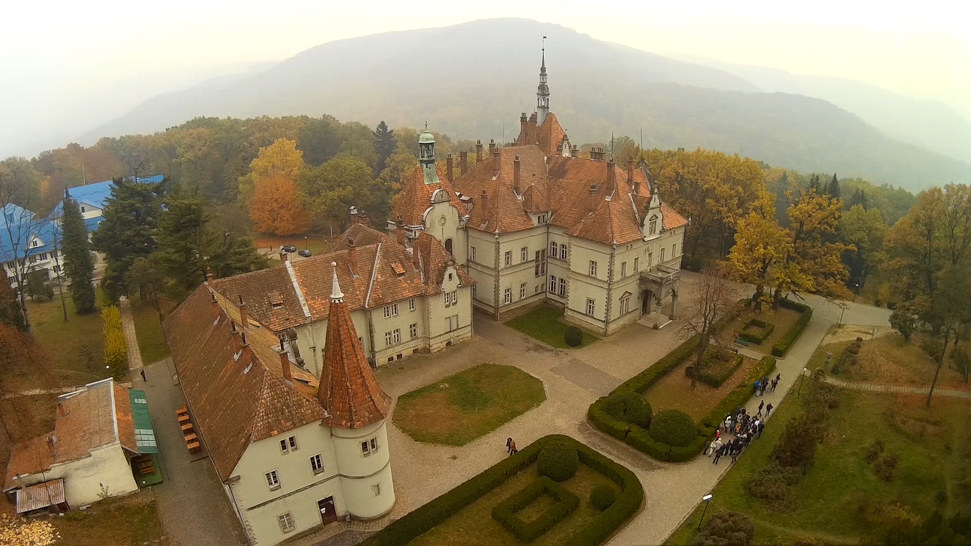 Палац Шенборнів осінню